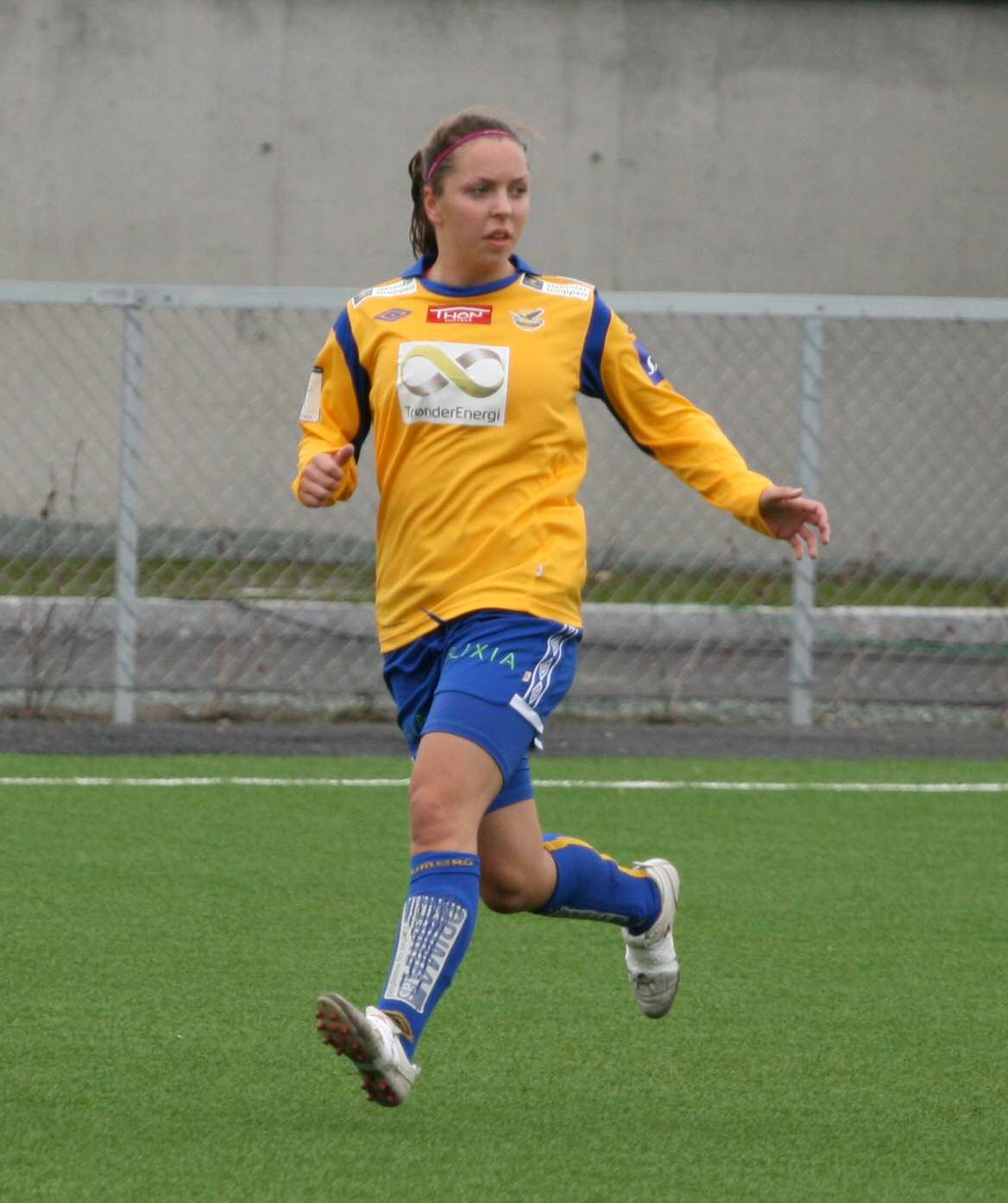 Fotballspilleren Ida Flakk